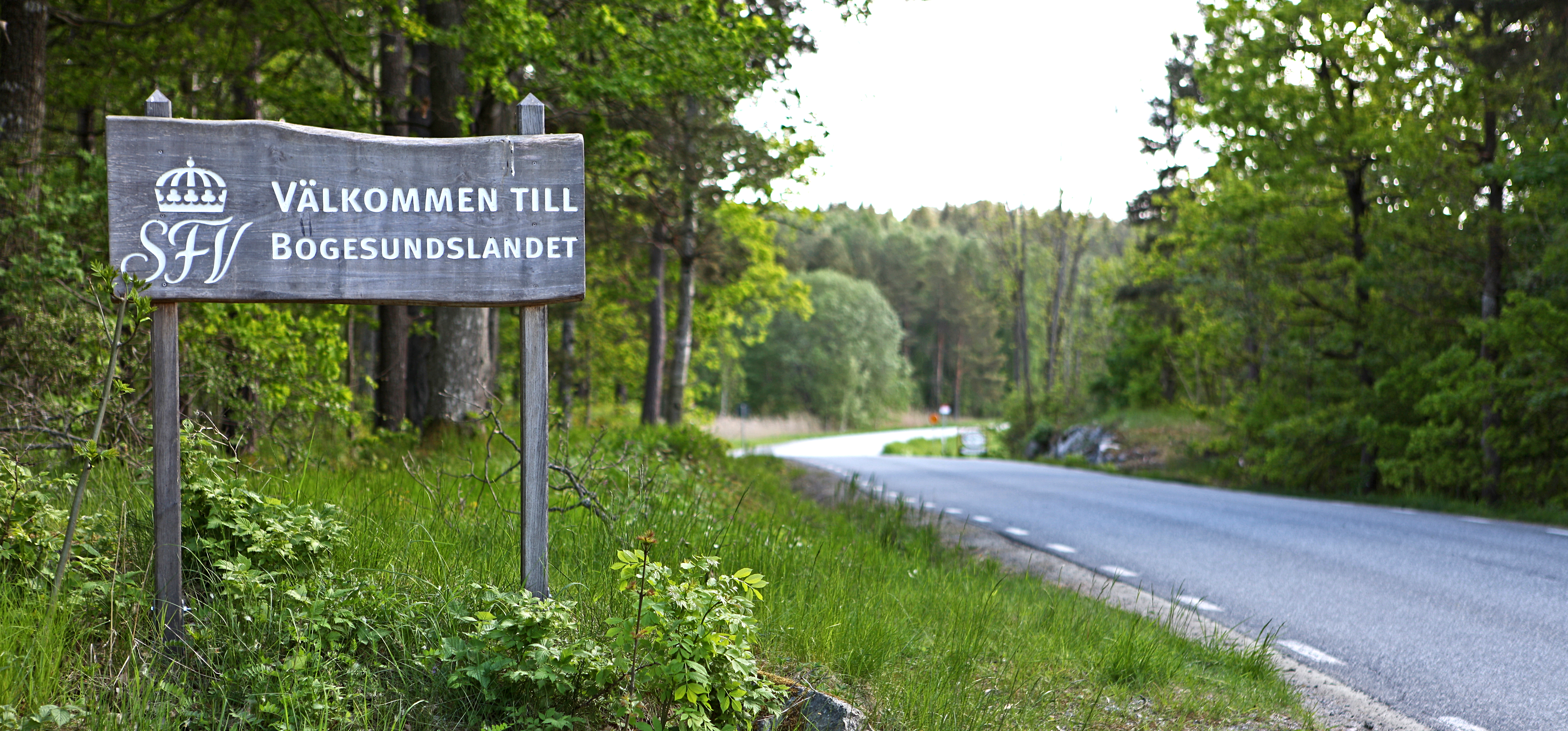 Välkommen till Bogesundslandet.